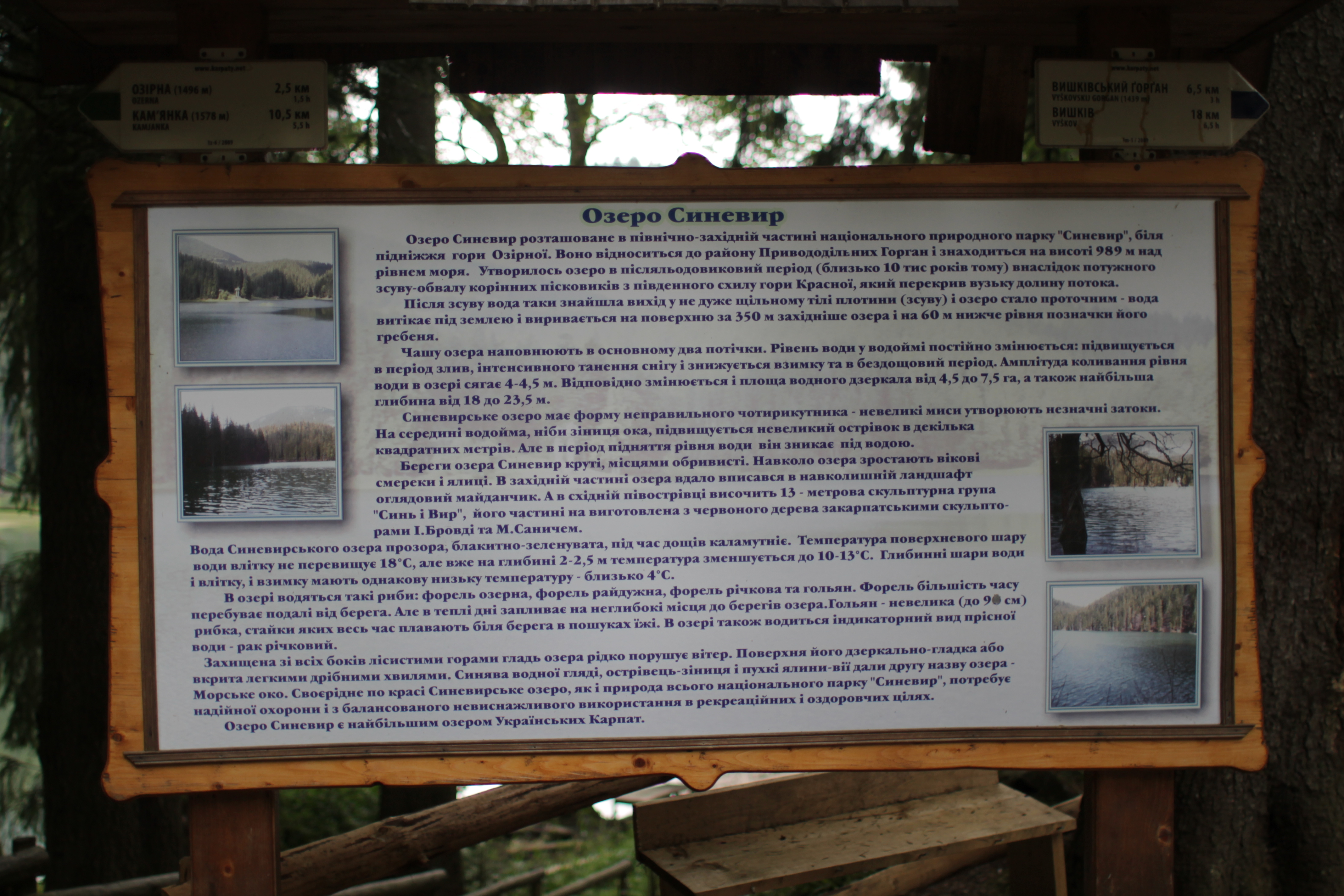 Озеро синевир, 3